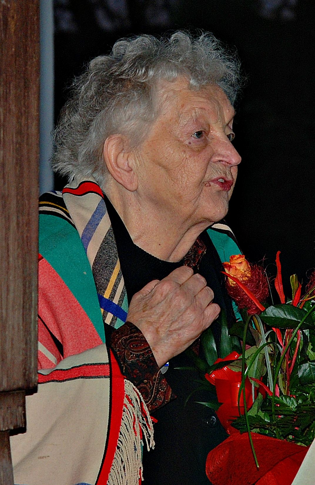 Maria Rydlowa podczas uroczystości osadzania chochoła przed Rydlówką